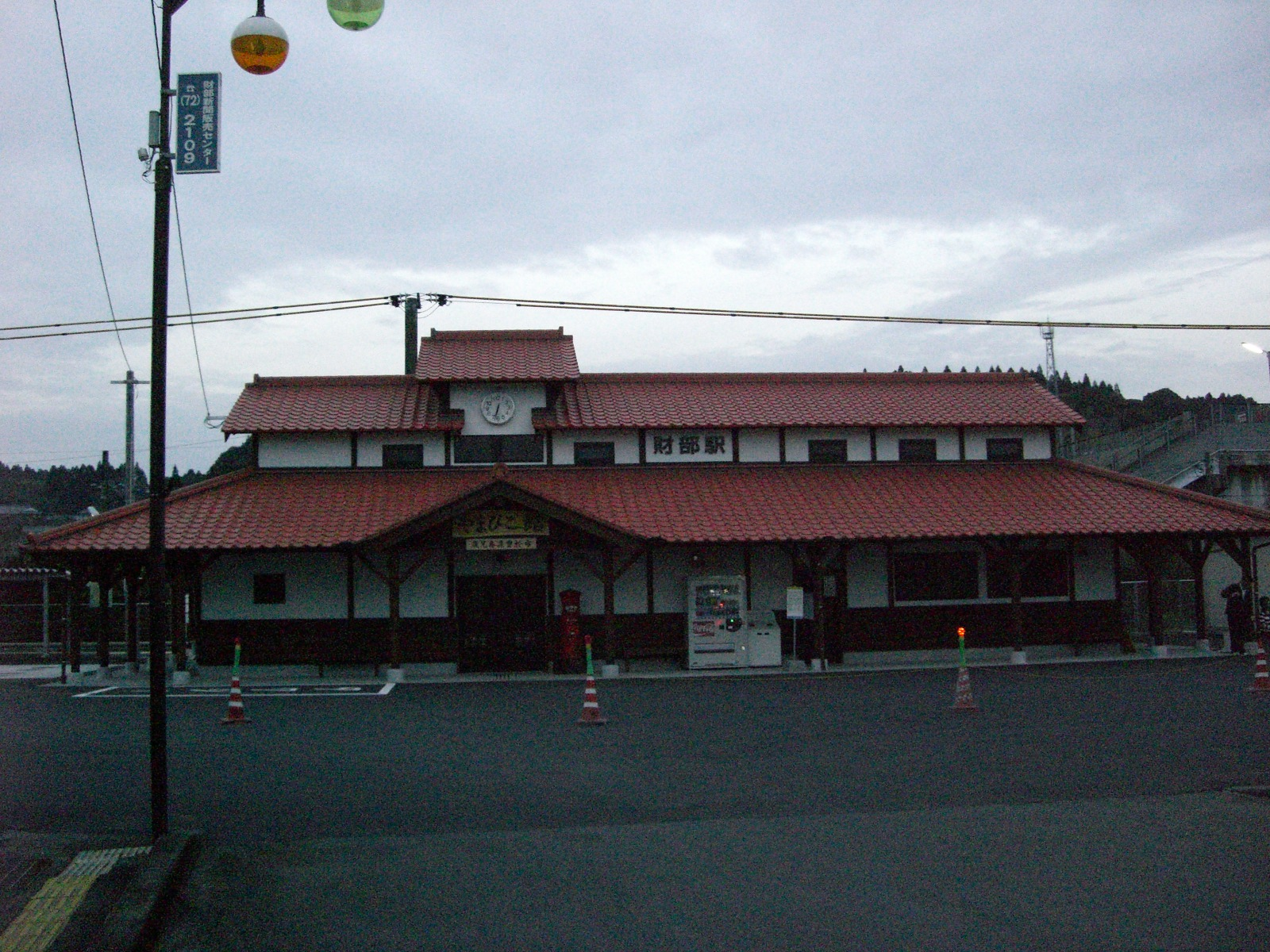 財部駅駅舎